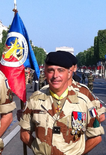 Photo du Général Barrera